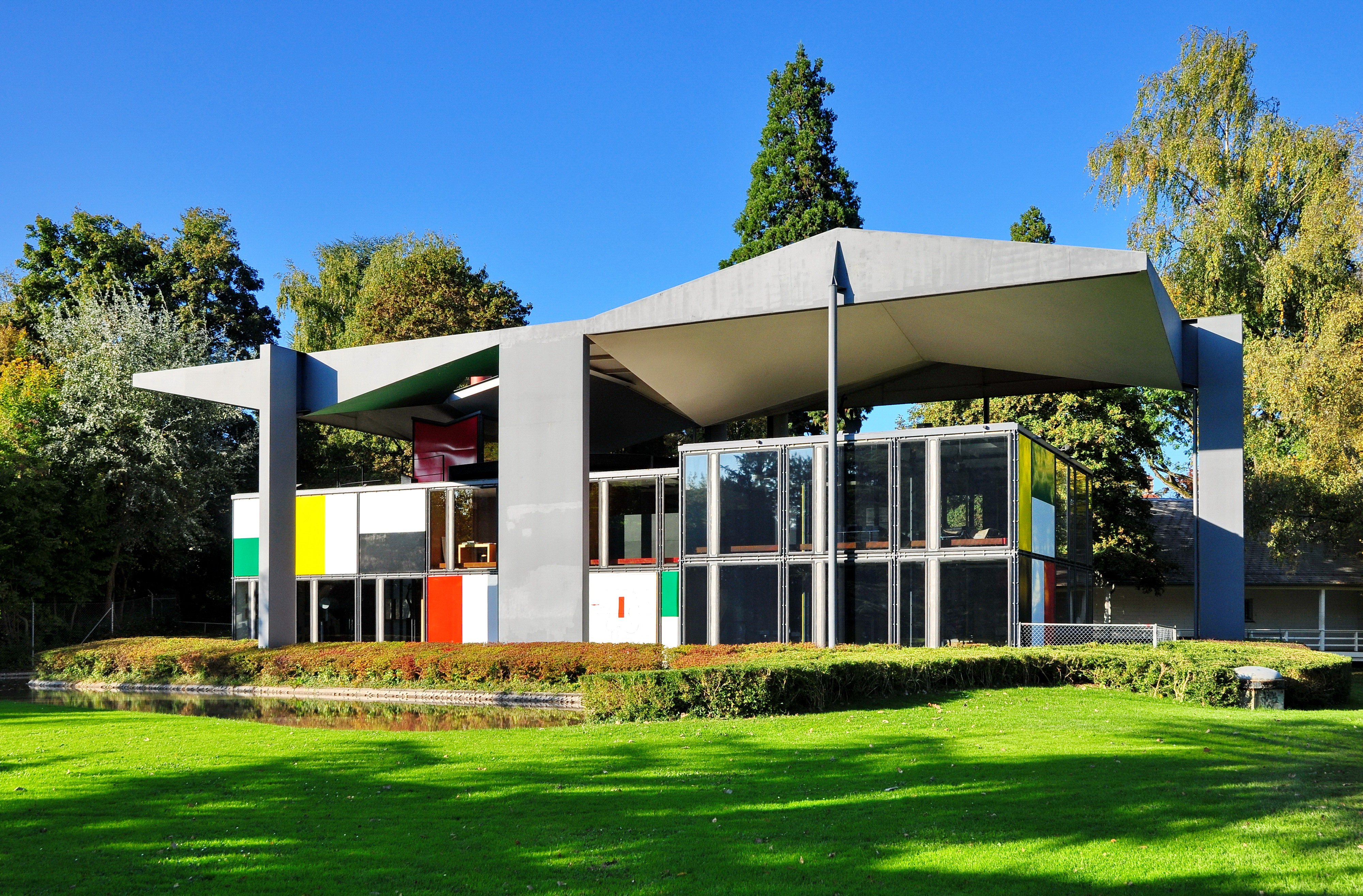 Centre Le Corbusier (Heidi Weber Museum) in Zürich-Seefeld (Switzerland)